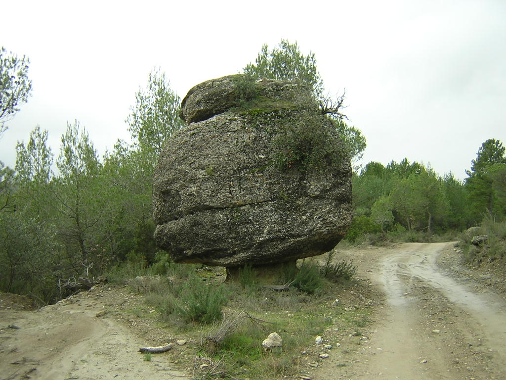 El Codro Bolet (Monistrol de Calders, Moianès)